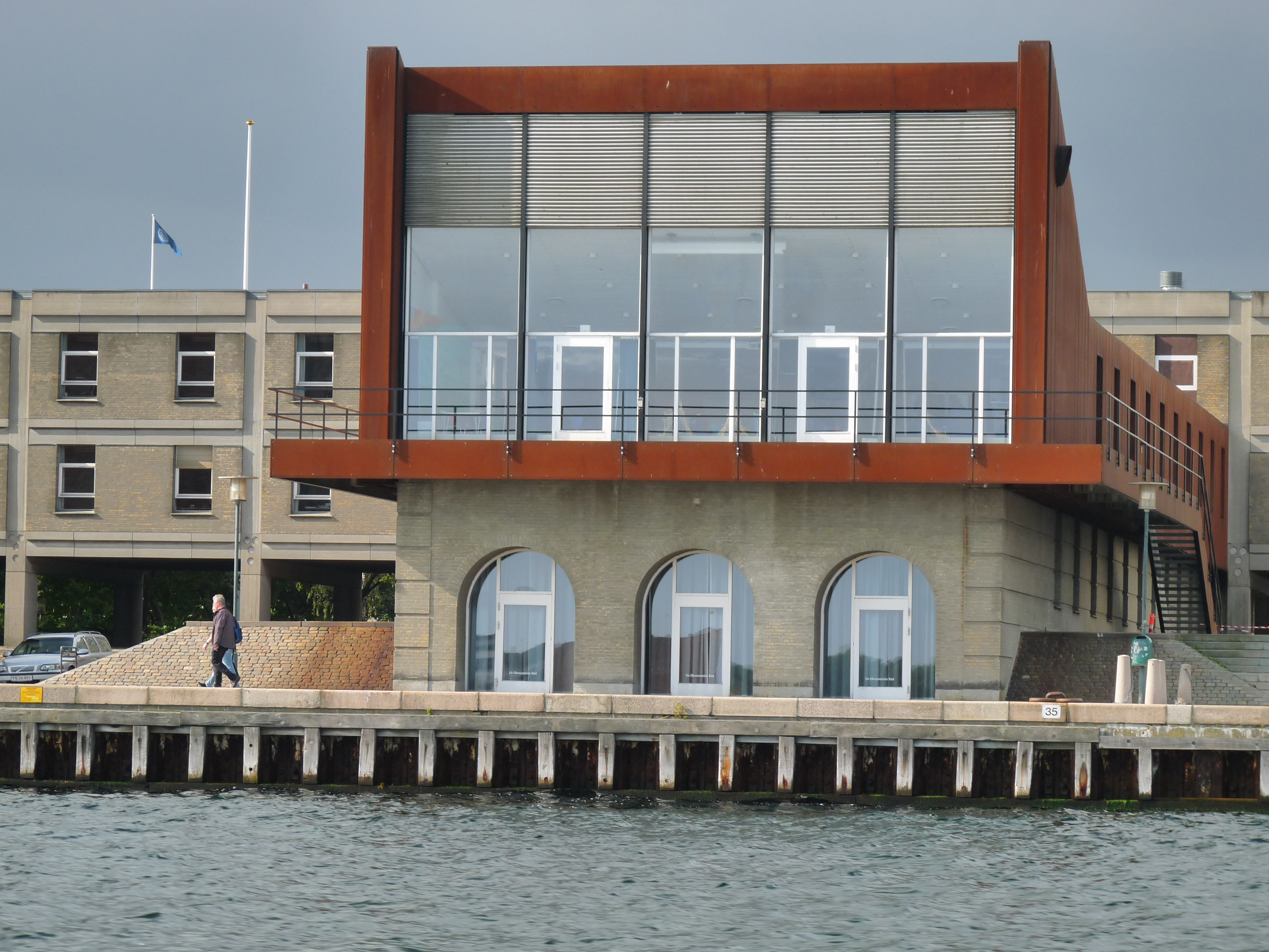 Nils and Eva Koppel's building for Told ( Skat at Nordre Toldbod (Amaliegade 66) in Copenhagen, Denmark